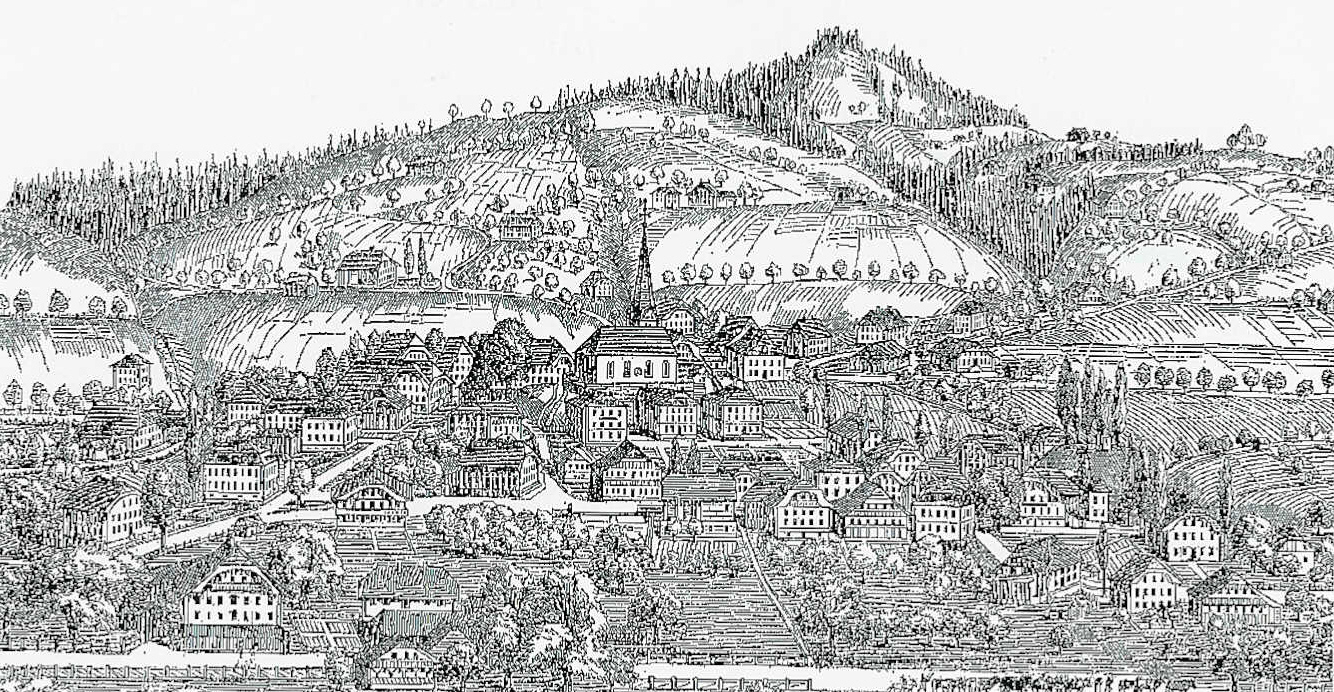 Langnau im Emmental, vermutlich um 1800